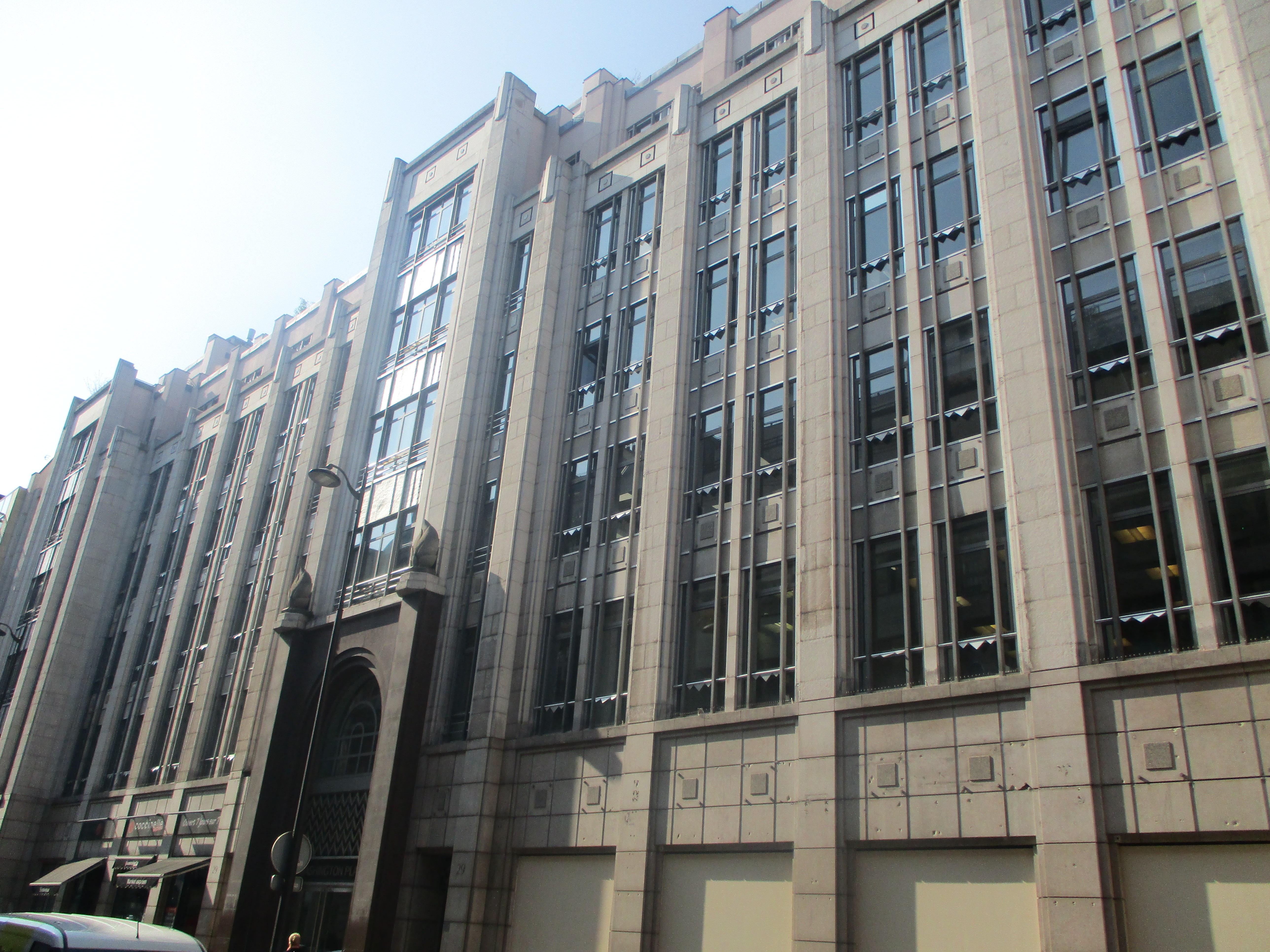 Immeuble Washington Plaza au 29 rue de Berri, Paris VIIIe. Ancien immeuble de la Shell construit entre 1929 et 1932.